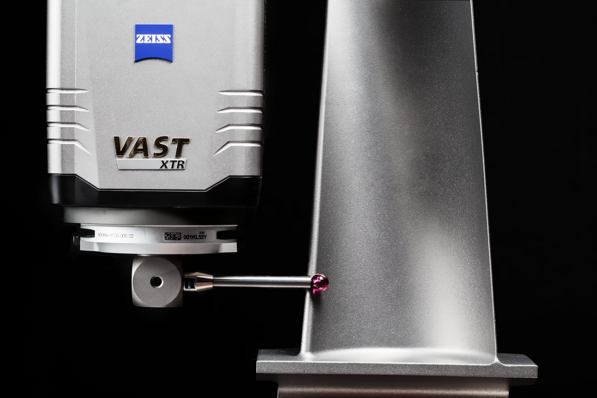 Blade 3D measuring